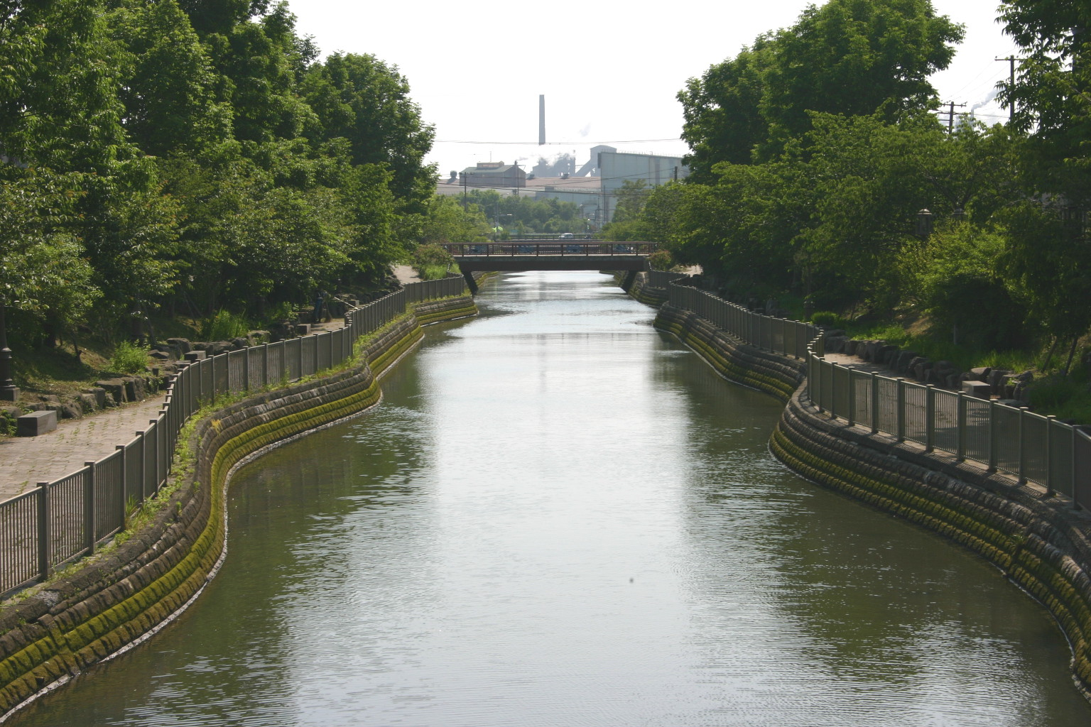 知利別川（室蘭市） らん蘭橋より下流を望む